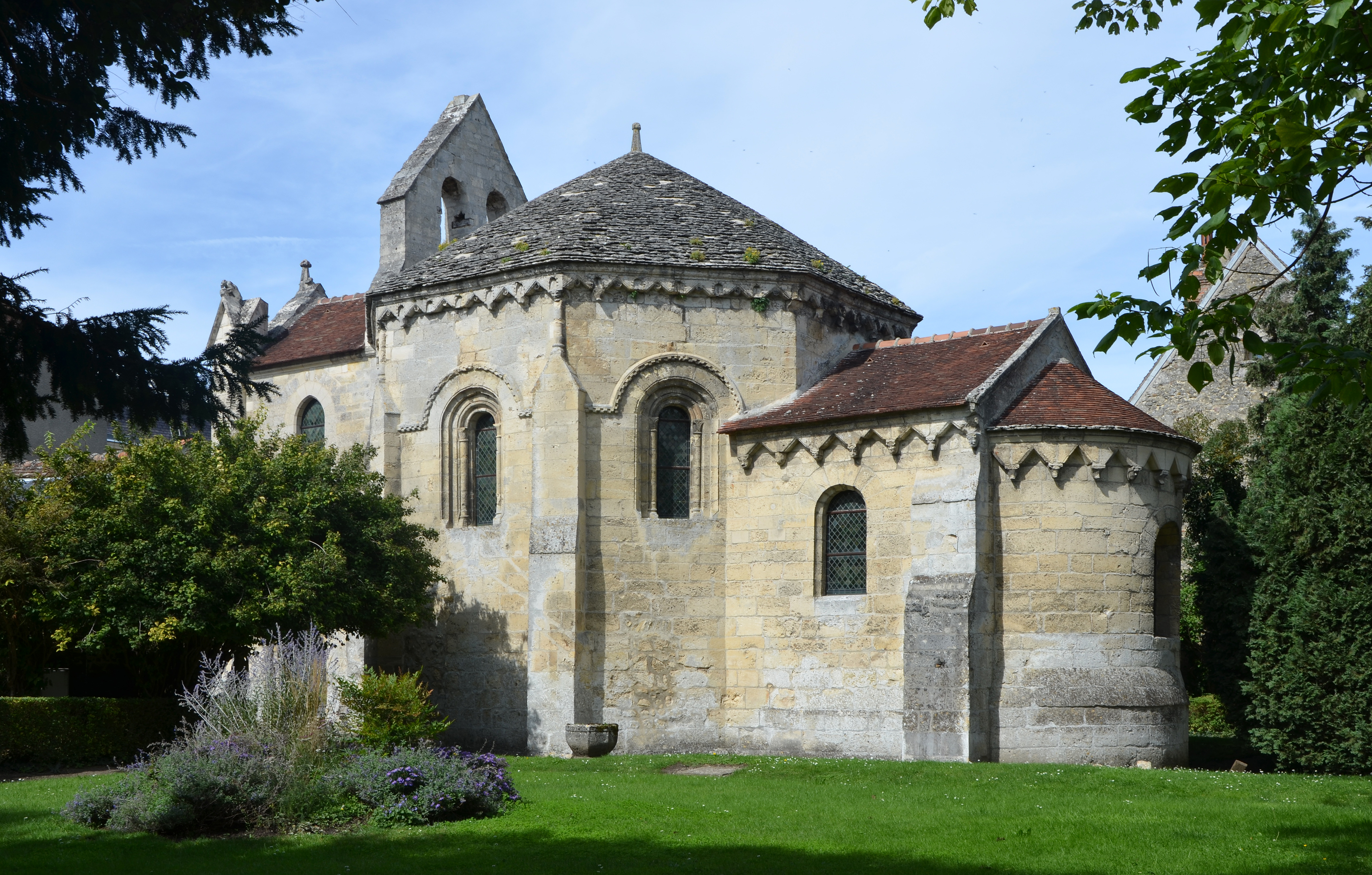 Chapelle de la commanderie des Templiers de Laon, Aisne, France .